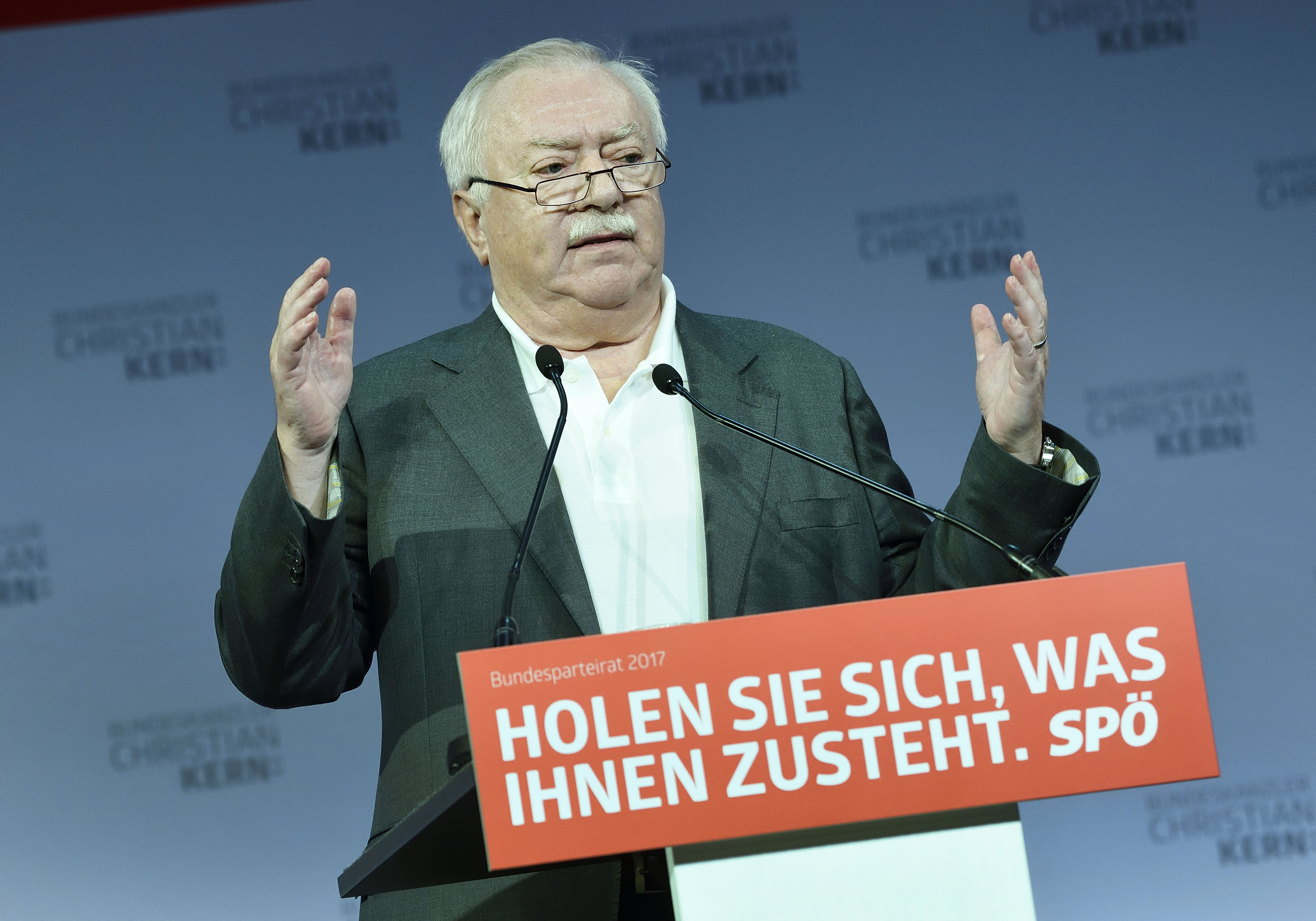 Bürgermeister Michael Häupl